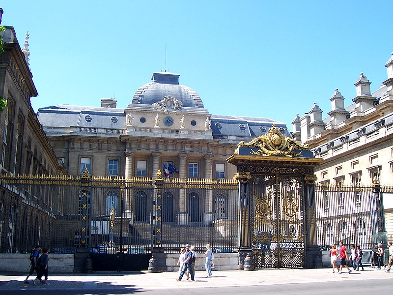 Parigi - Palais de Justice